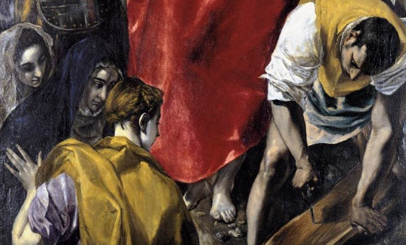 Detalle del cuadro El Expolio, pintado por El Greco y conservado en la sacristía de la catedral de Toledo, (España).